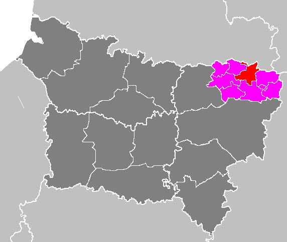 Maps of arrondissements and cantons of France: Arrondissement de Vervins - Canton de la Capelle.PNG